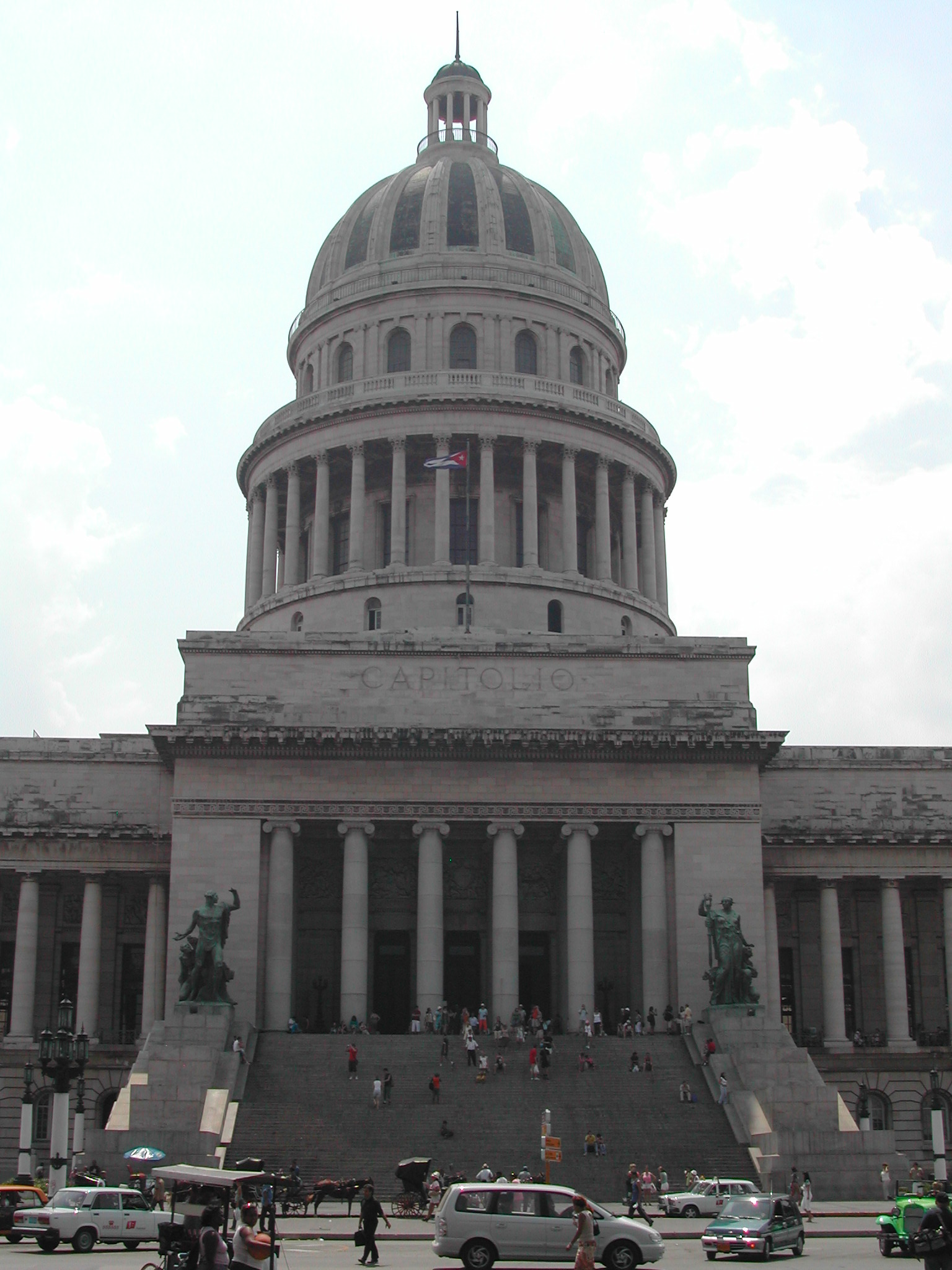 De Kapitol zu Havanna